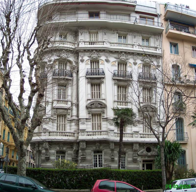 Les palais de Nice. Epoques diverses. Iconographie Nice. Palais de la Paix - Bd Dubouchage situé à l'angle de l'avenue Maréchal Foch. Architecture "Belle époque" et surélévation des années 1960